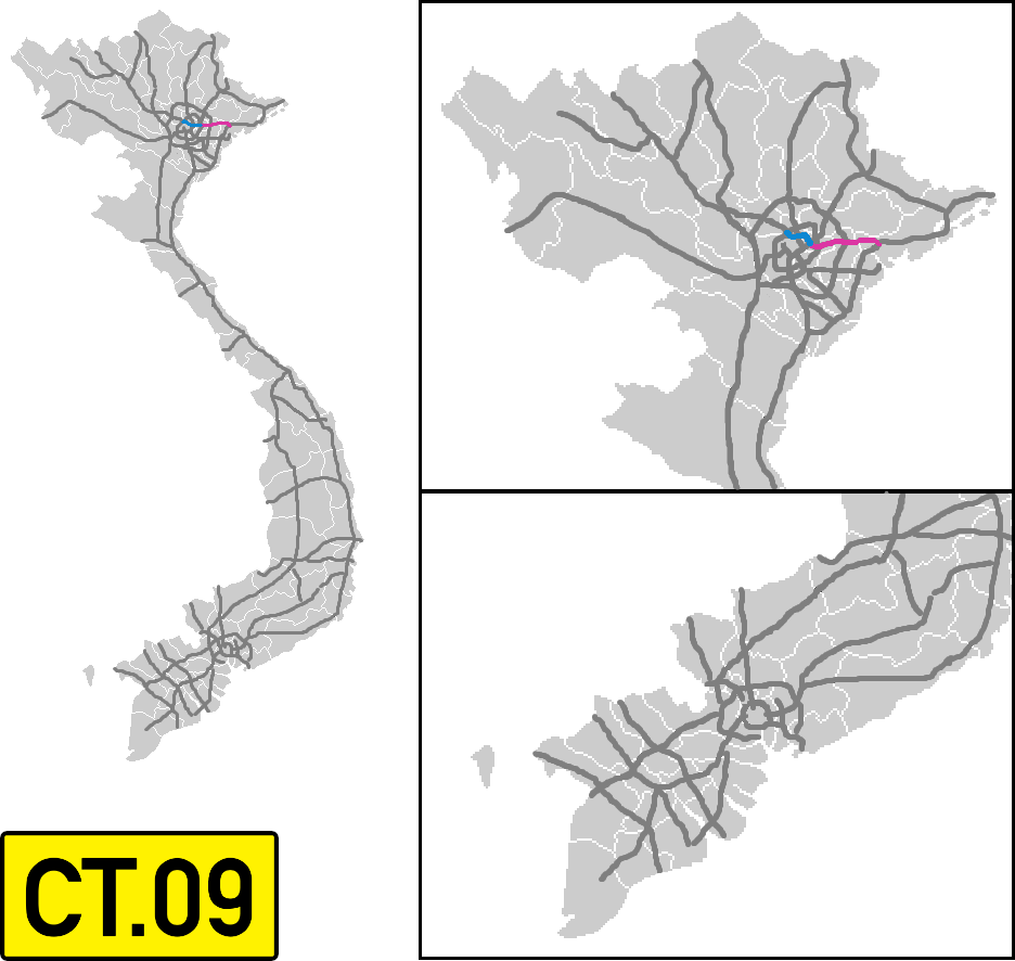 نقشه آزادراه شماره 09، موسوم به آزادراه نین بین - هایفونگ - کوانگ نینگ